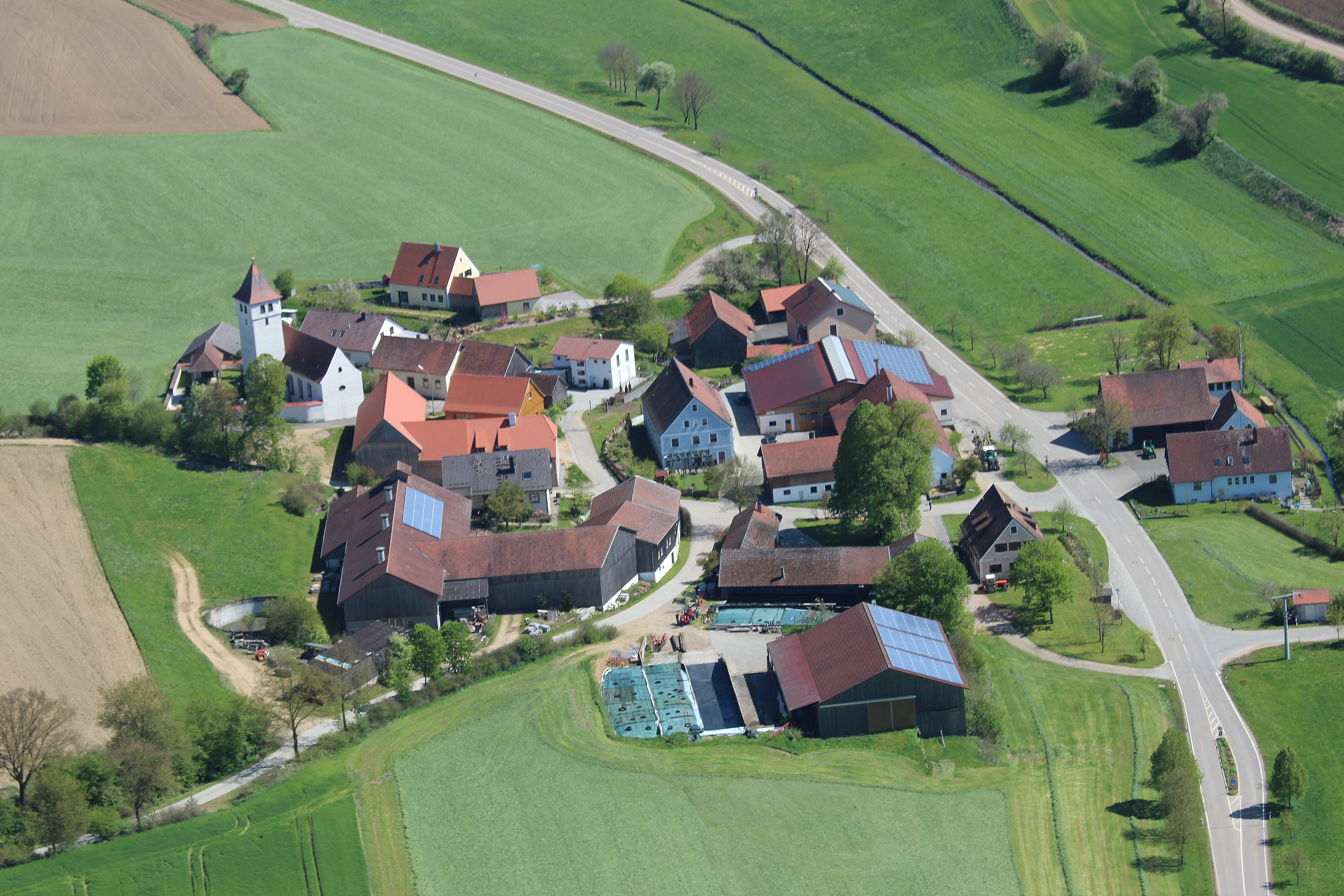 Mitterauerbach, Stadt Neunburg vorm Wald, Landkreis Schwandorf, Oberpfalz, Bayern